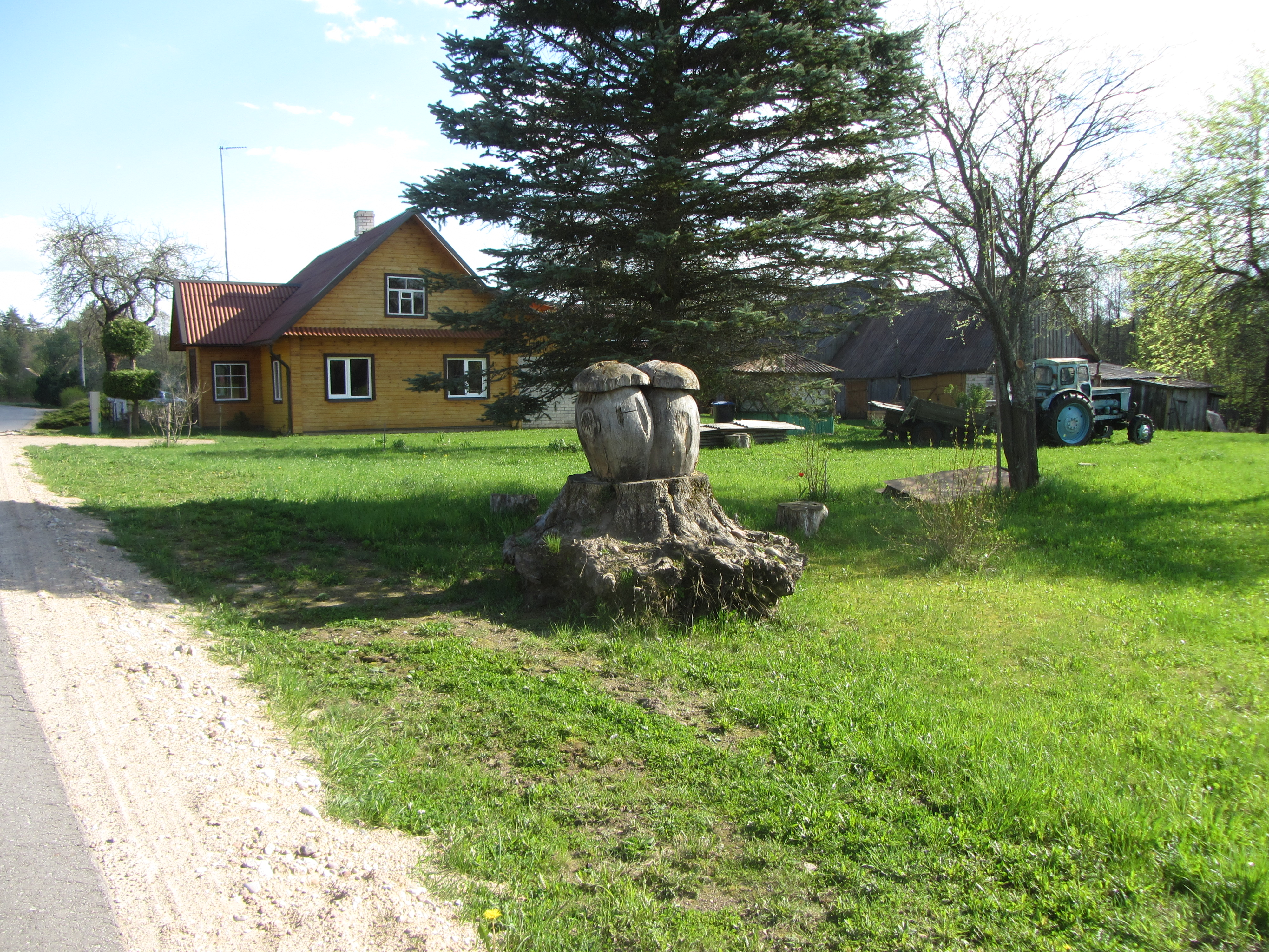 Prūdiškė, Lithuania